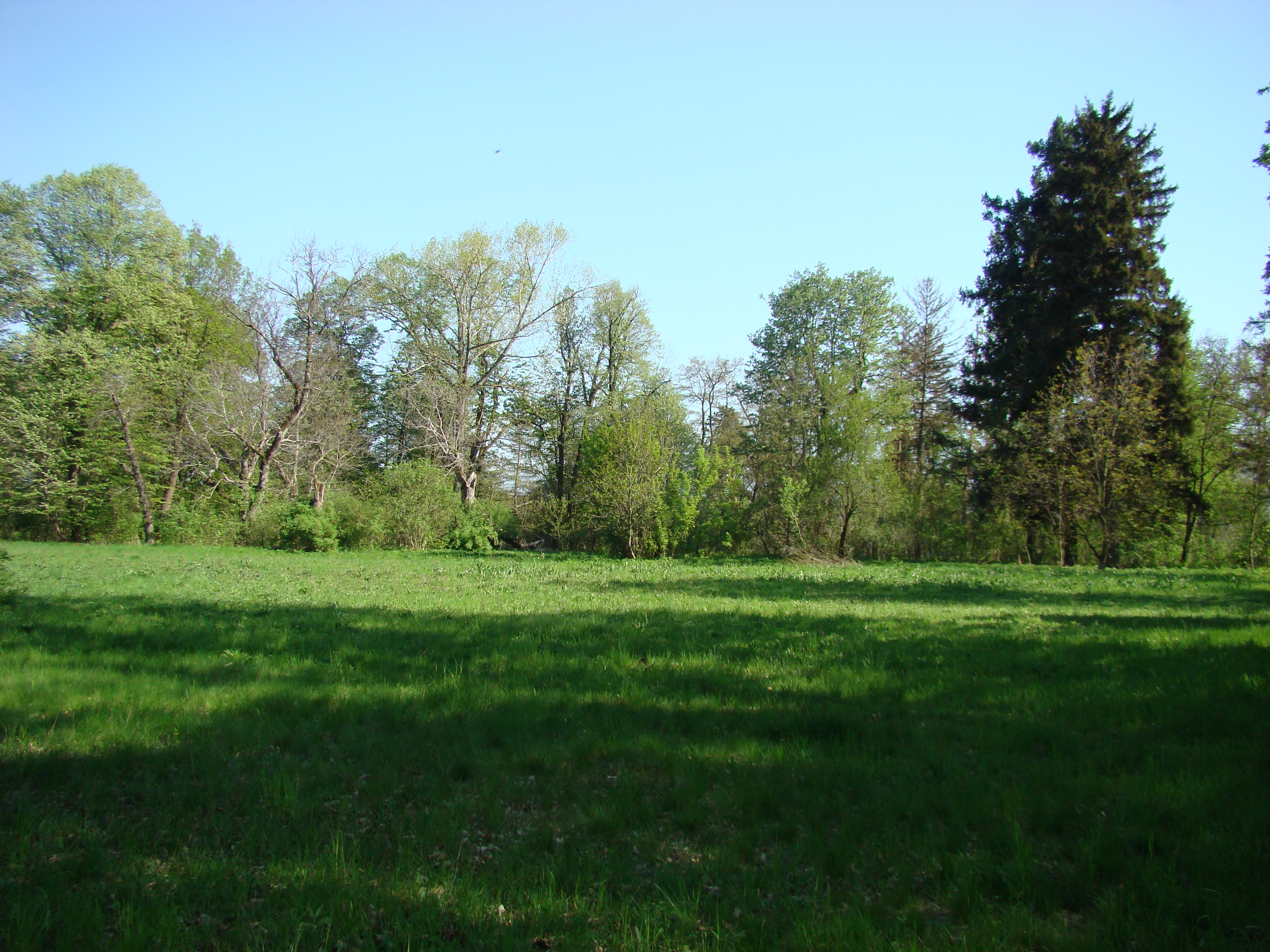 Ansamblul conacului Nalatzi-Fay, ocalitate componentă NĂLAŢVAD; oraş HAŢEG